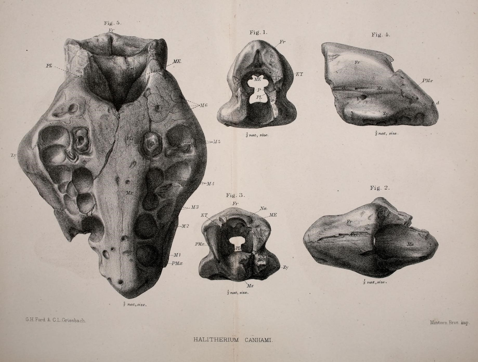 Fig. 1. ET Fig. 2. PM.T G.H Ford & G.L.Gries'bach. Mmtern Bro.°. imp , HALITHERIUM CANHAMI.